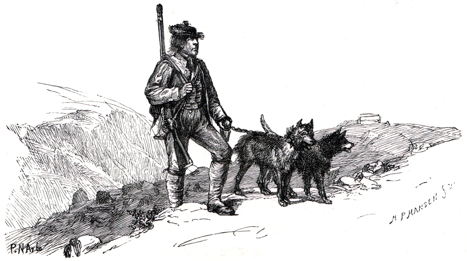 Illustration for the folktale Per Gynt in the book Norske Folke og Huldre-Eventyr i udvalg ved P. Chr. Asbjørnsen. Andet oplag. 1896